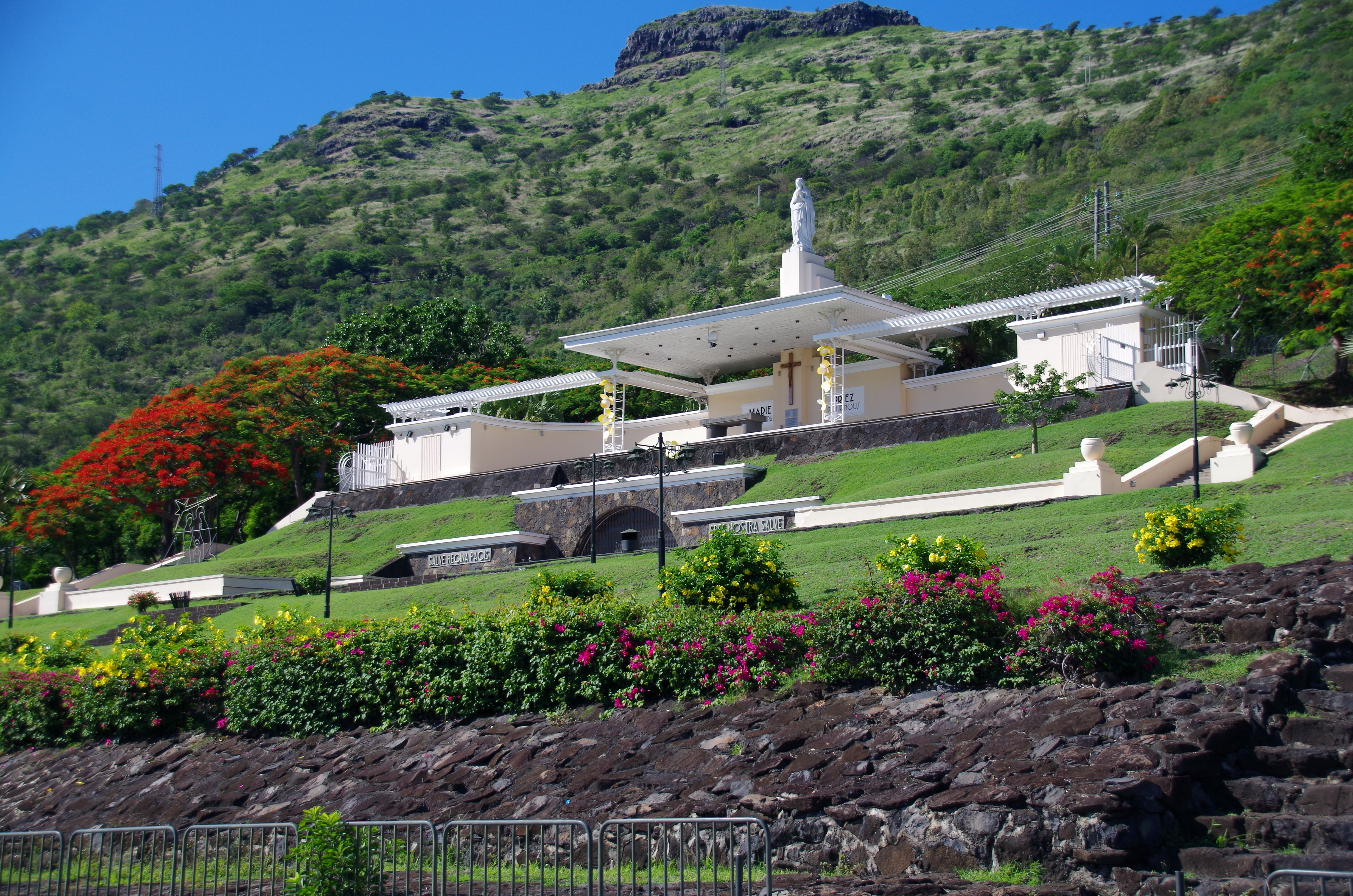 Mauritius